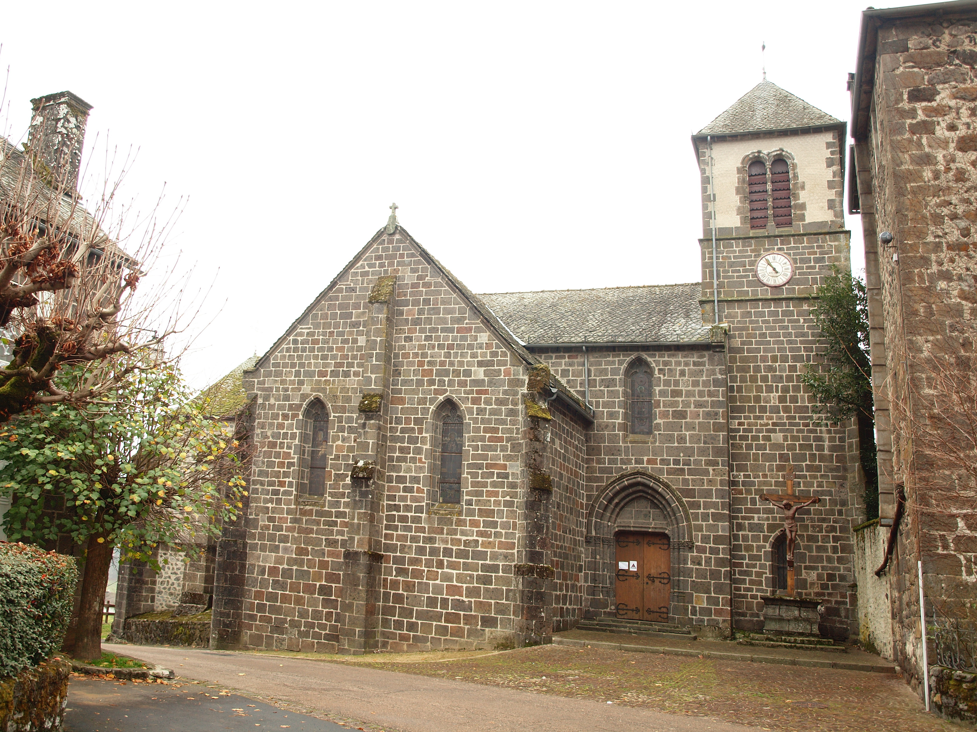 Saint-Chamant (Cantal, France)